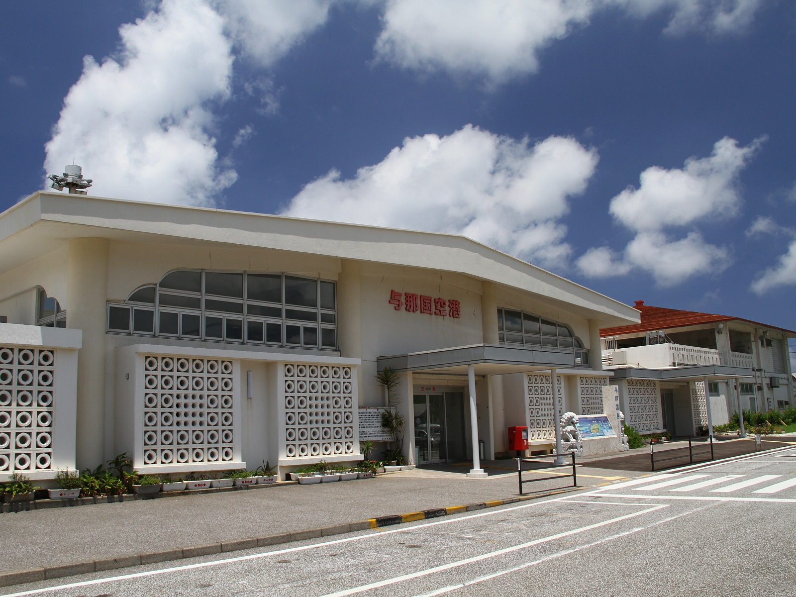 沖縄県八重山郡与那国町（与那国島）にある与那国空港ターミナルビル。 Photo by "Si-take." & uploaded it to Wikipedia(JA). Category:沖縄県の画像Category:空港画像